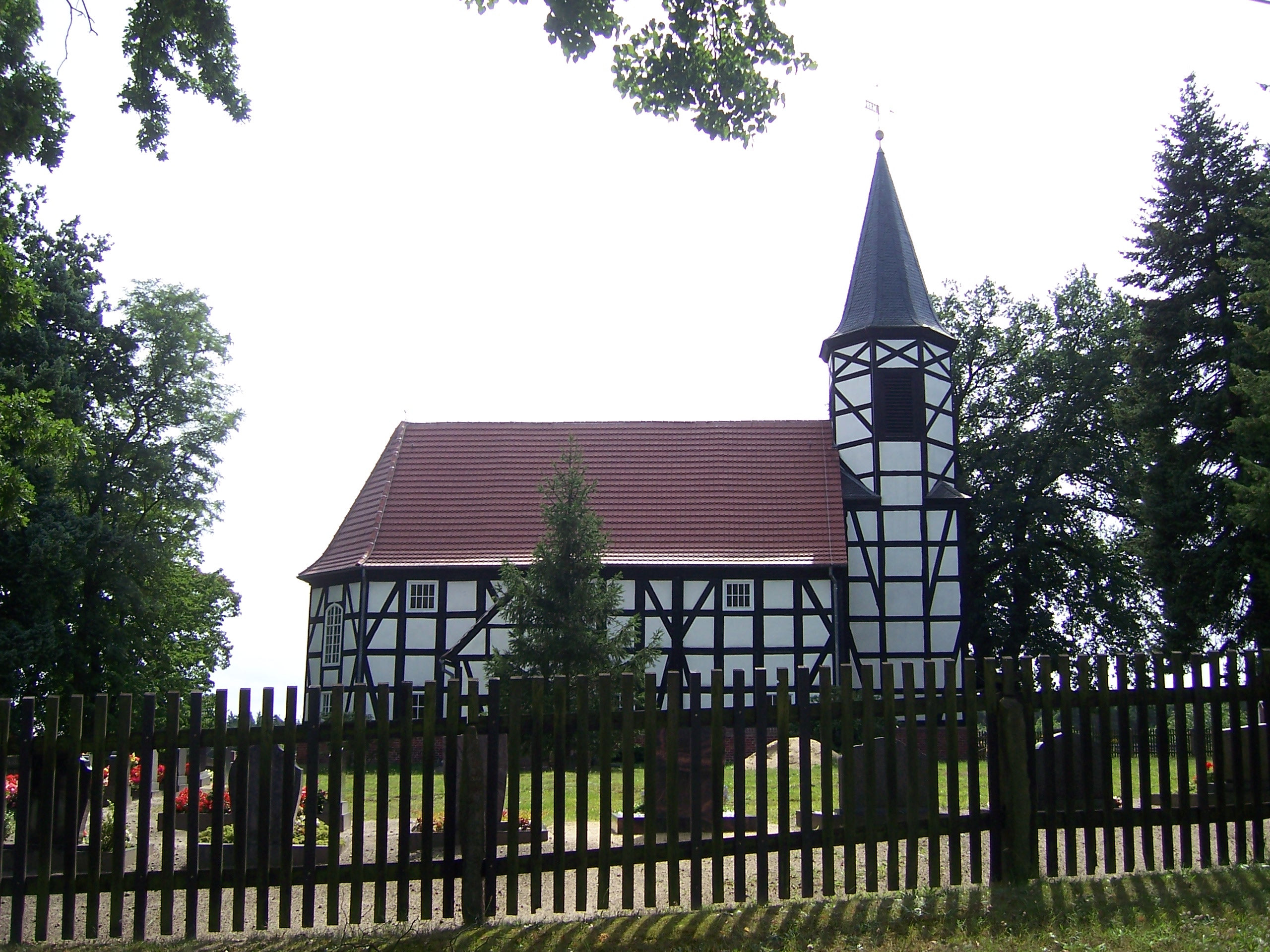 Fachwerkkirche in Spreewitz (Oberlausitz, Sachsen) Hornjoserbsce: Tykowana cyrkej w Šprjejcach Map: 51° 30′ 29″ N, 14° 23′ 54″ E